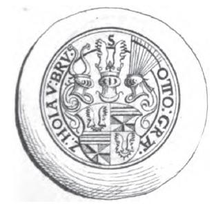 Siegel des Grafen Otto VIII. von Hoya von 1581, gest. 1582